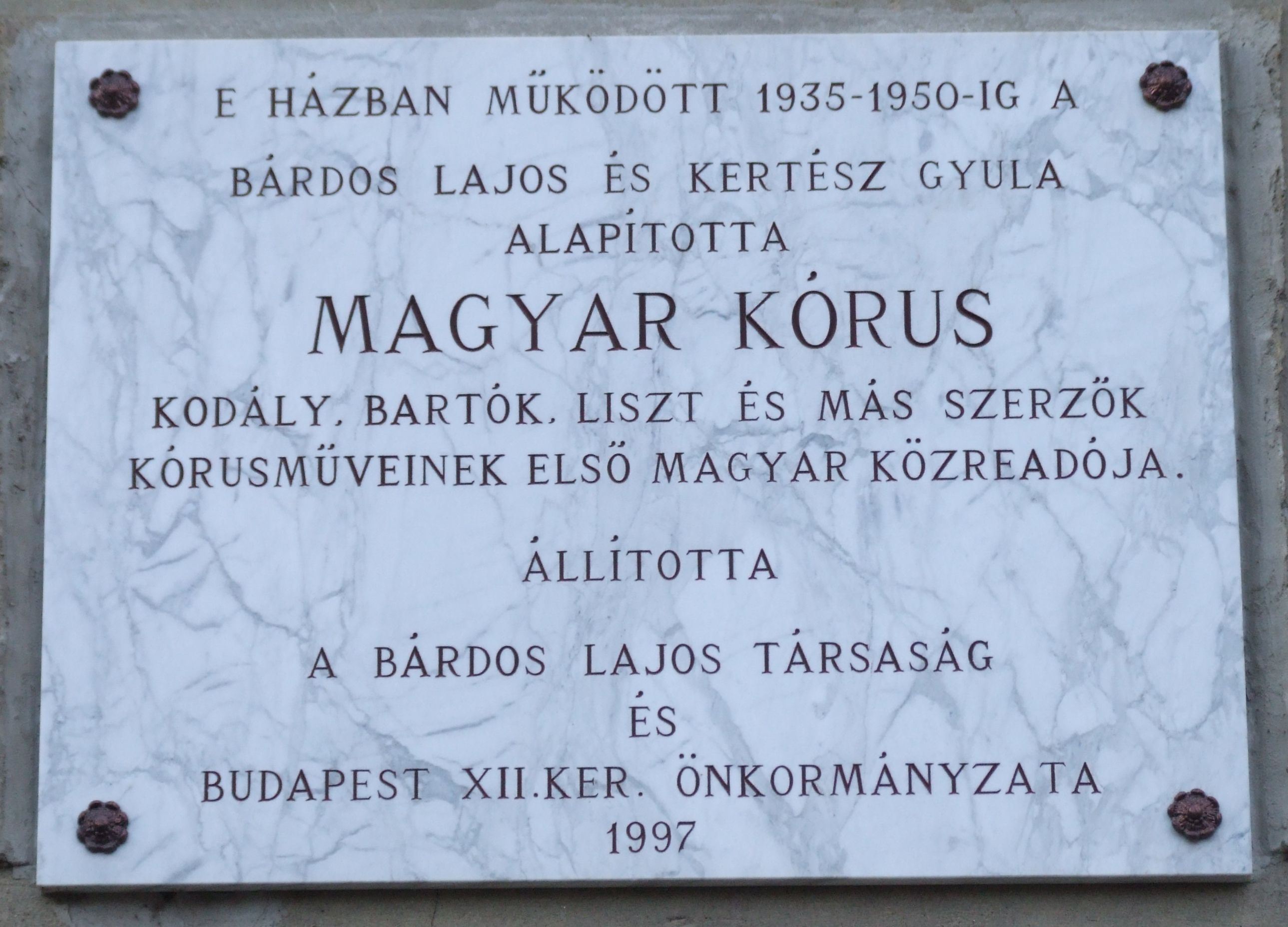 Magyar Kórus emléktáblája, Budapest XII. kerülete, Kiss János altábornagy utca 55.